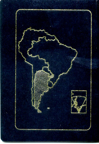 Contratapa de un pasaporte argentino actual.